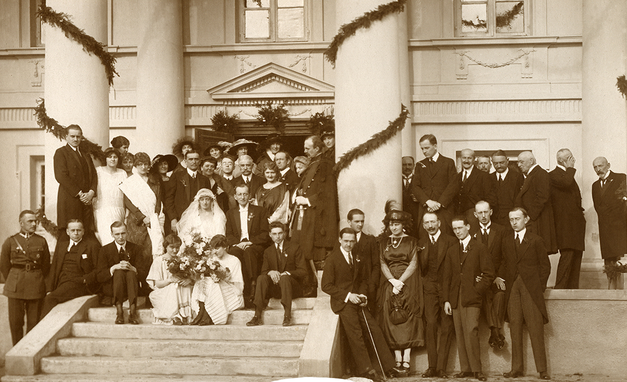 Wesele Tadeusza Morawskiego i Julii Lubomirskiej